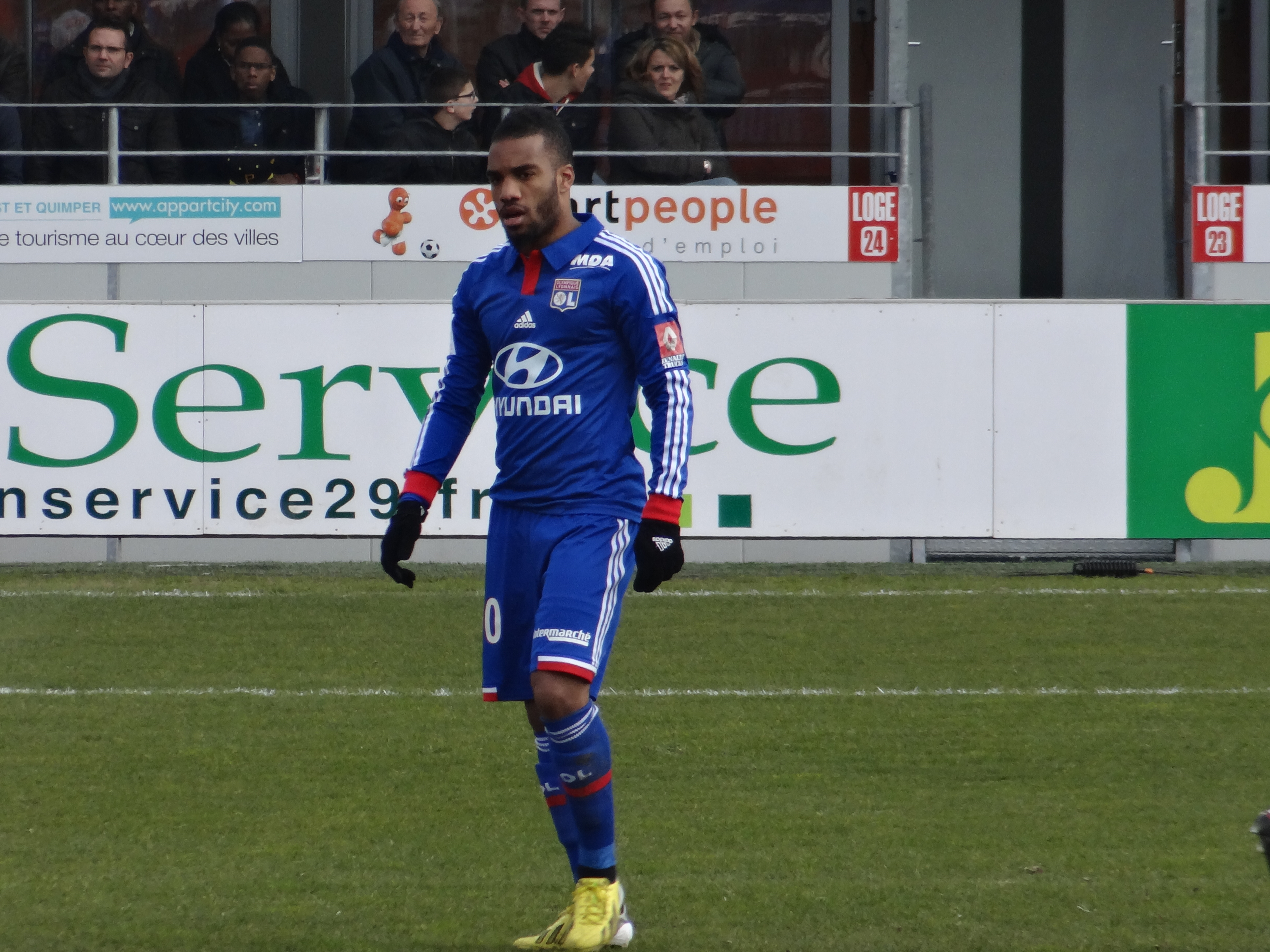 Match de football (Ligue 1) entre le Stade brestois 29 et l'Olympique lyonnais, le 3 mars 2013